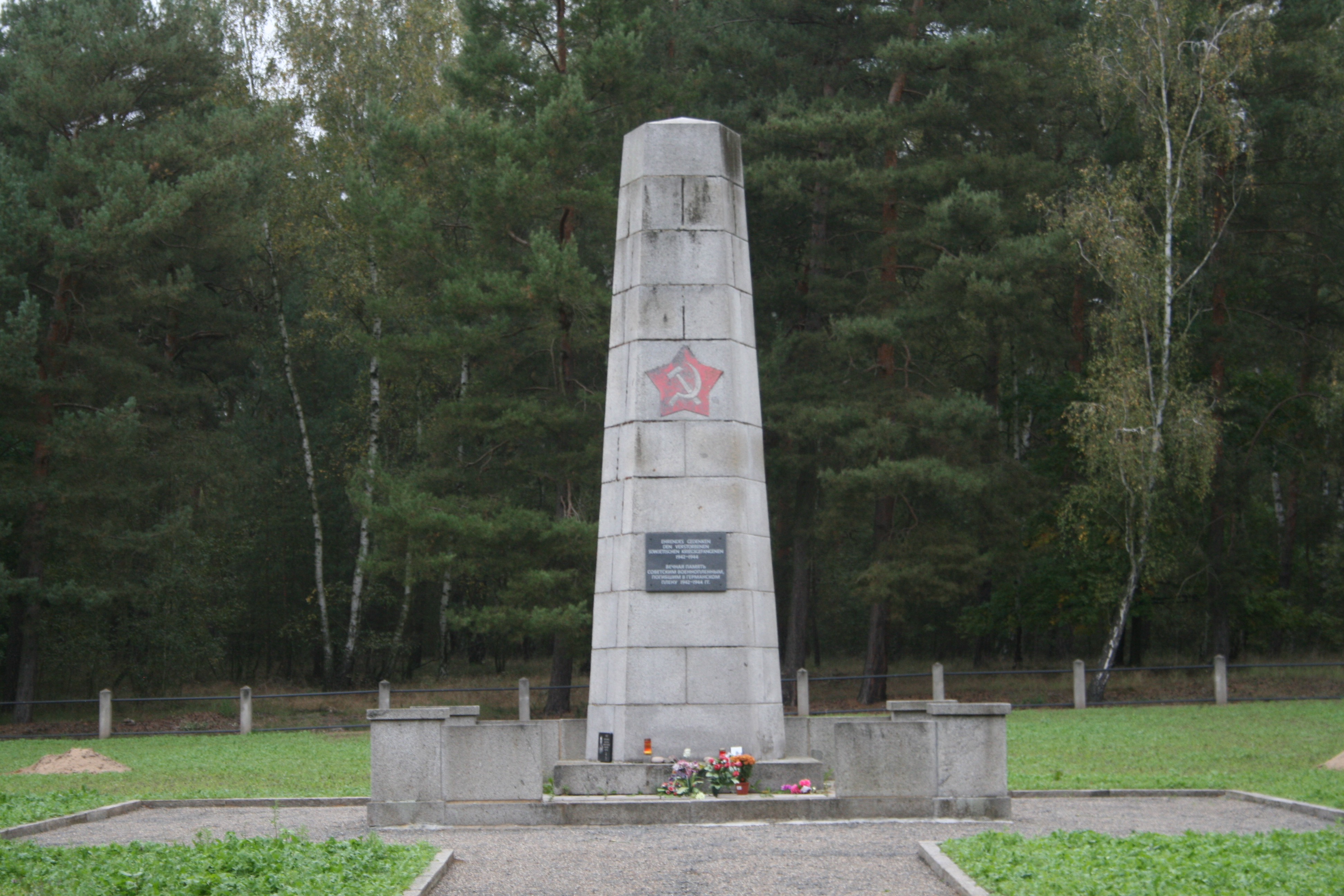 Ehrenmal auf der Kriegsgräberstätte Zschepa II